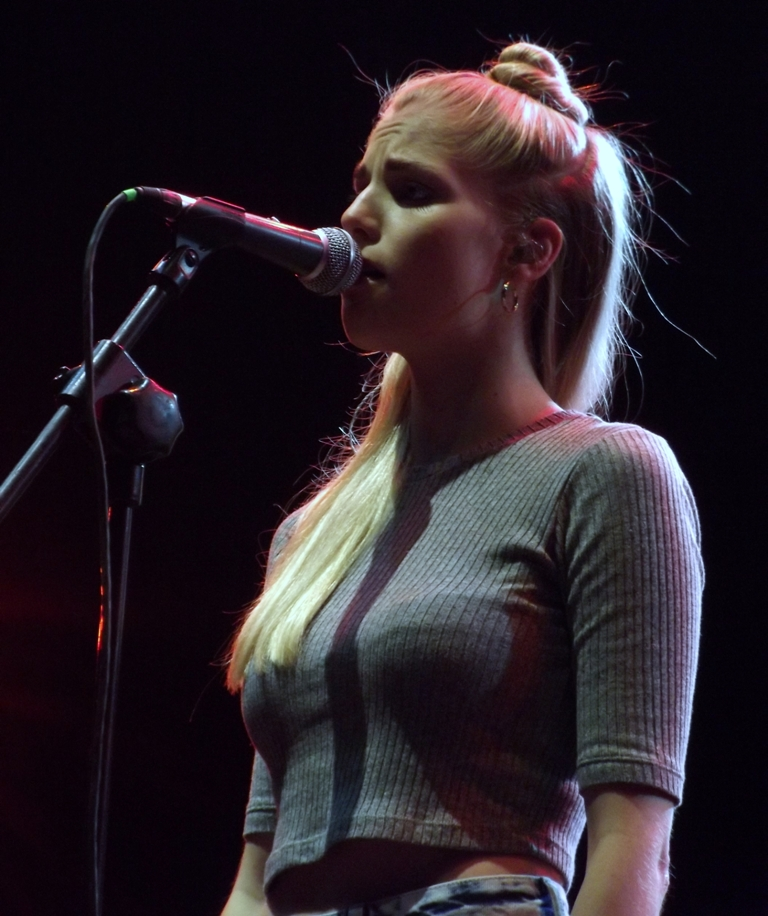 Zdjęcie zrobione podczas 8. edycji festiwalu Tauron Nowa Muzyka, w katowickiej Dolinie Trzech Stawów.